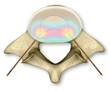 biacuplasty